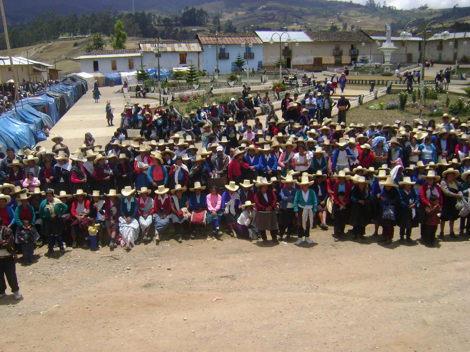 Plaza Central del distrito la Libertad de Pallán